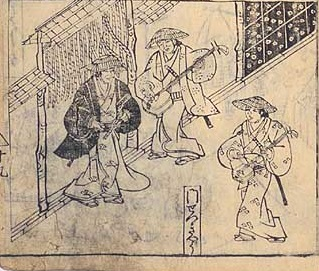 『人倫訓蒙図彙』（1690年）より「門説経」挿図